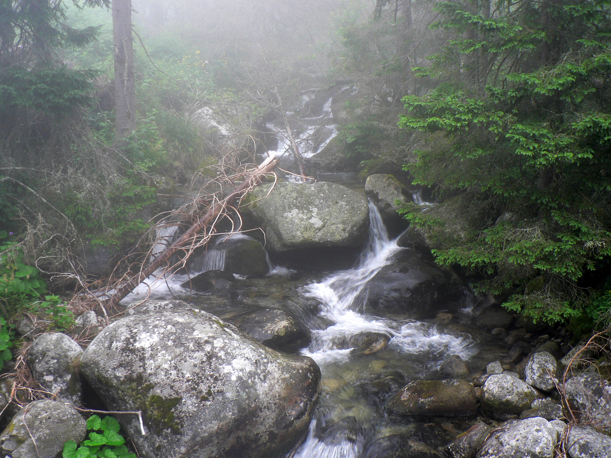 Wielicka Woda w dolnej części Doliny Wielickiej